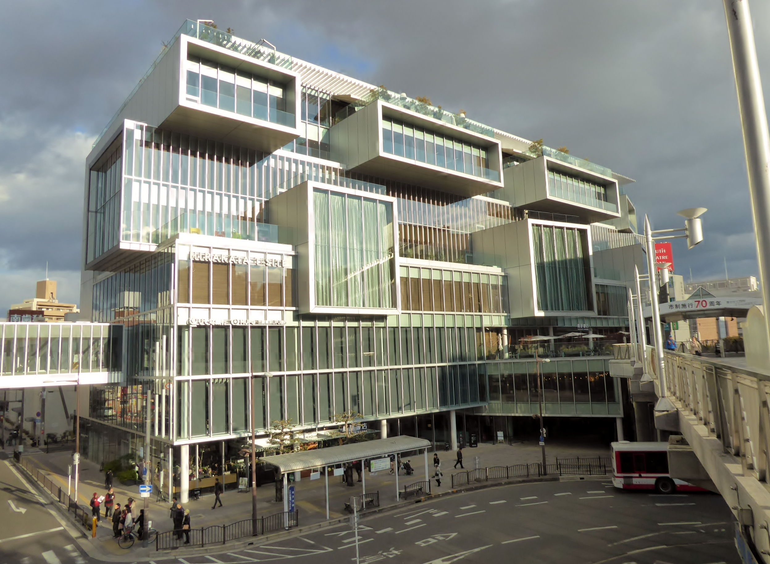 枚方T-SITEを撮影。